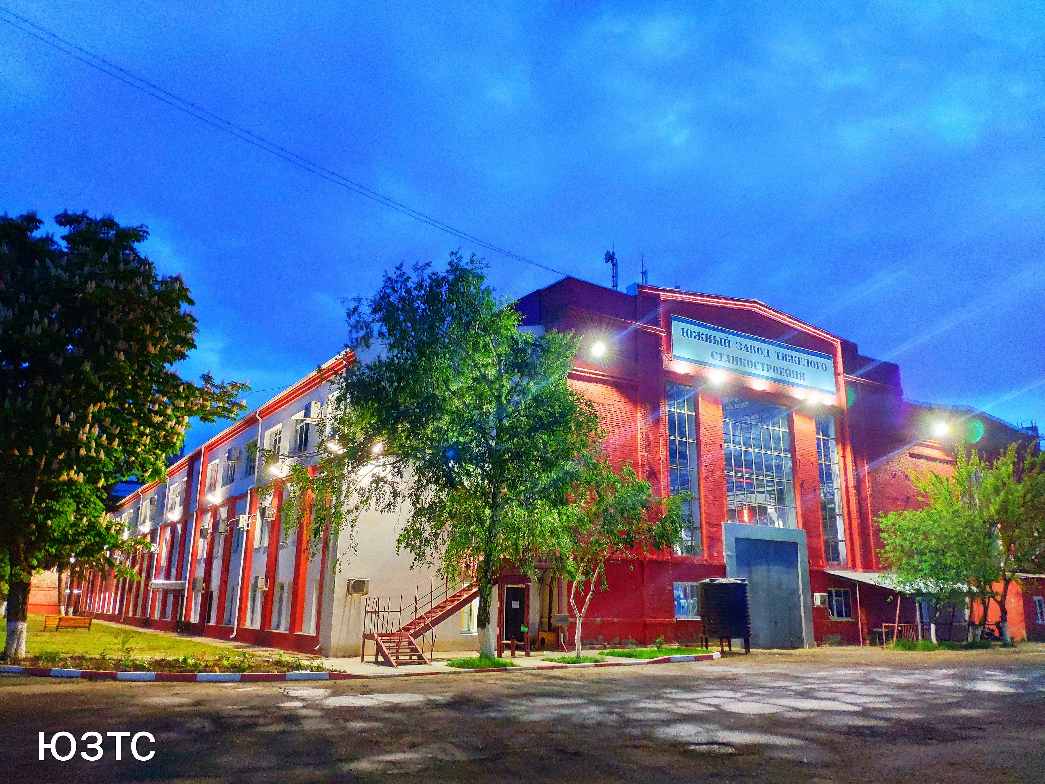 "Южный завод тяжёлого станкостроения" - ЮЗТС (бывший 2мск завода им. Г.М. Седина) ночью